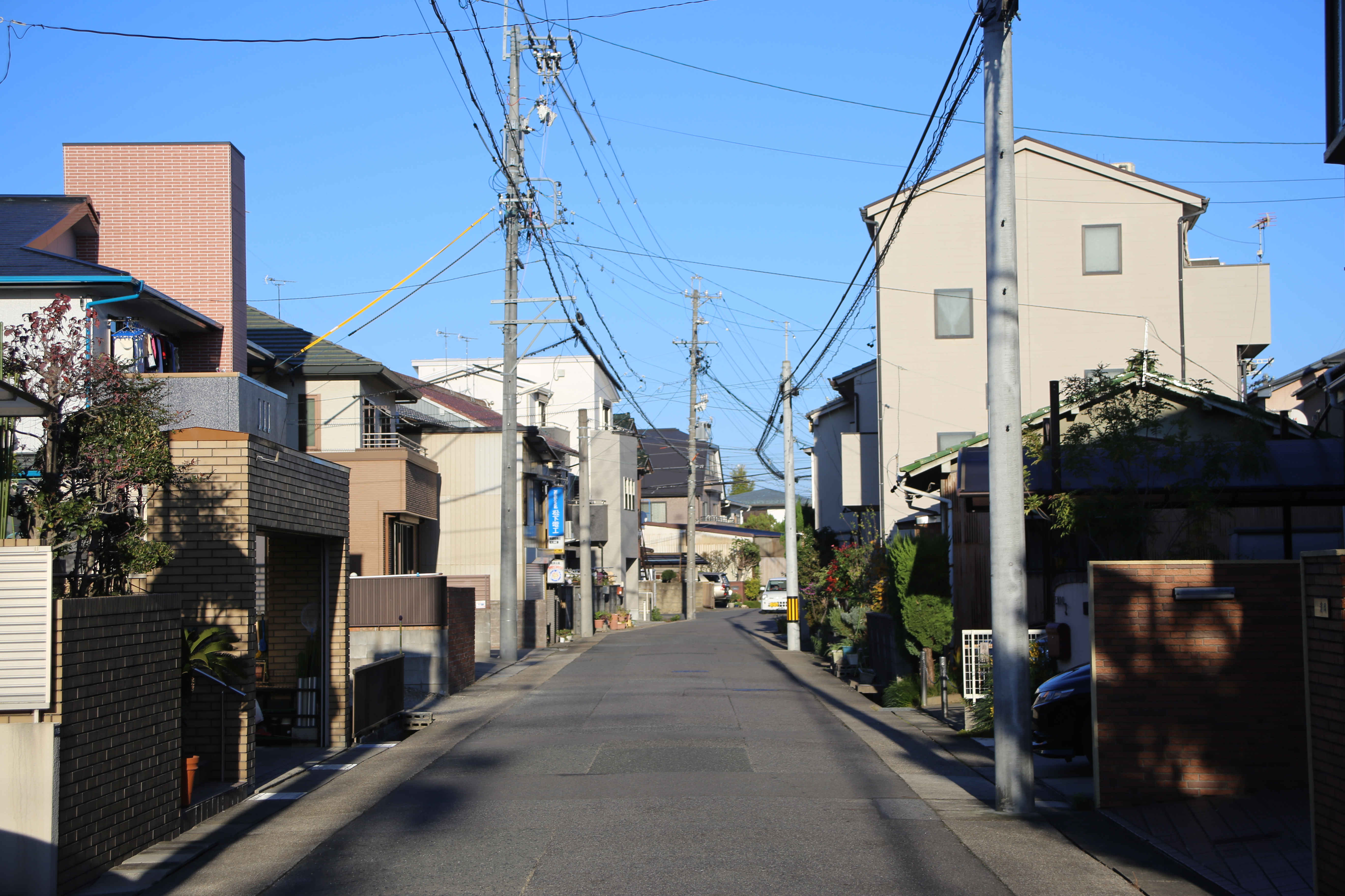 名古屋市千種区東千種台